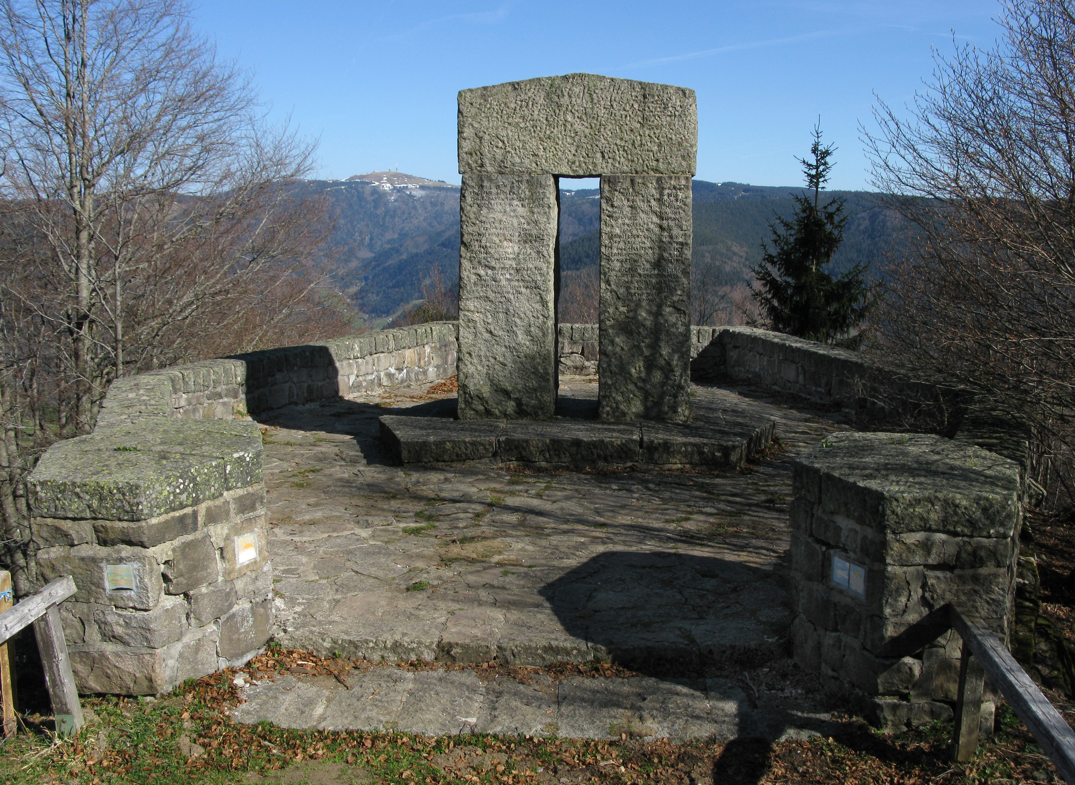 Engländerdenkmal am Schauinsland, im Hintergrund der Feldberg